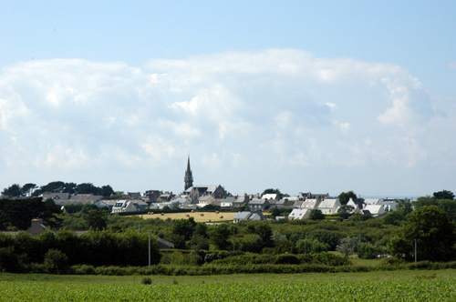 Vue de PLOUARZEL